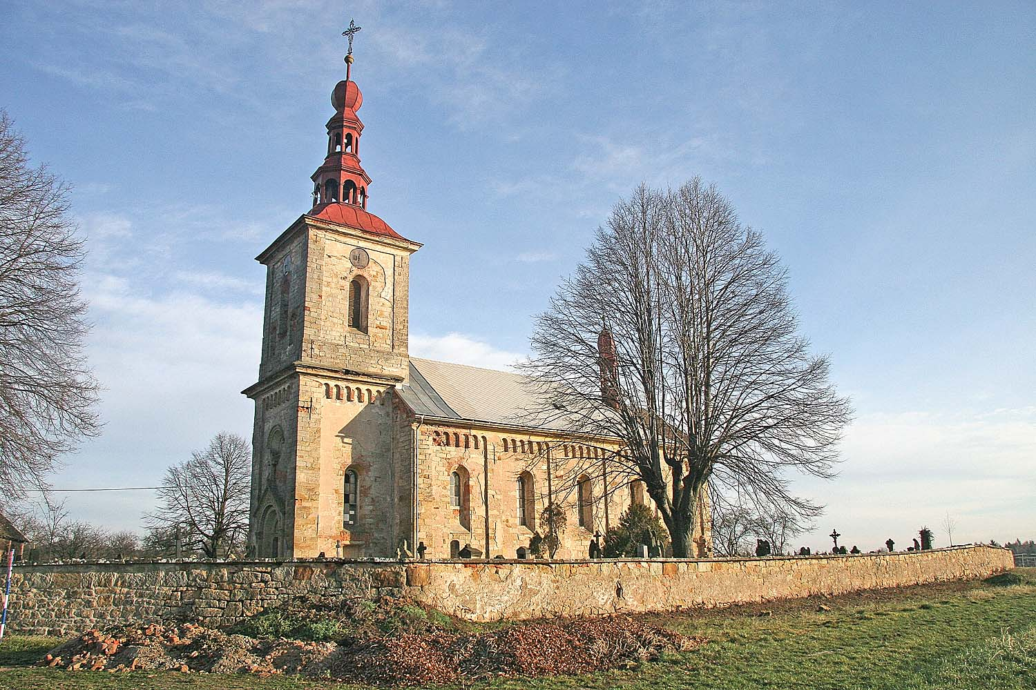 kostel Nejsvětější trojice v Litíči, district Trutnov autor: Prazak date: 2. 1. 2007